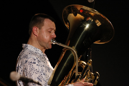 François Thuillier Solo